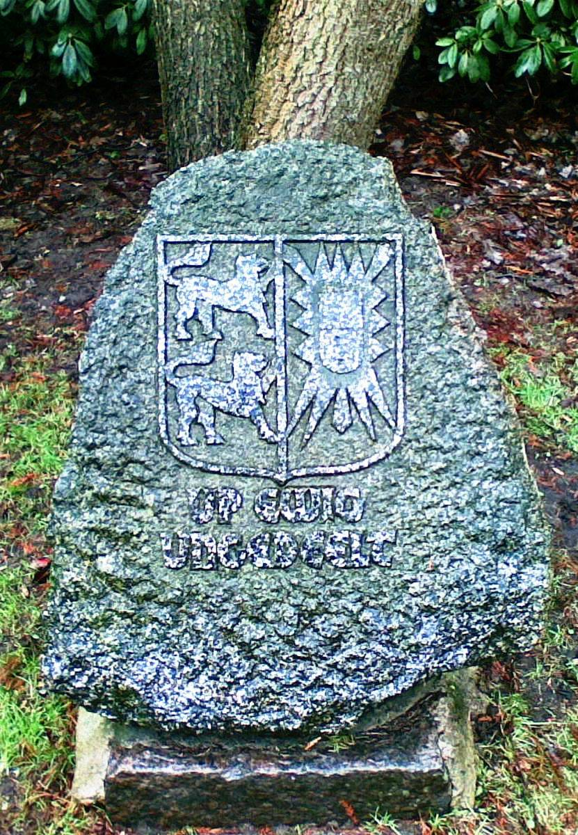 Gedenksteen Up Ewig Ungedeelt mit dat Wapen von Sleswig-Holsteen in’n Park Rahlstedt